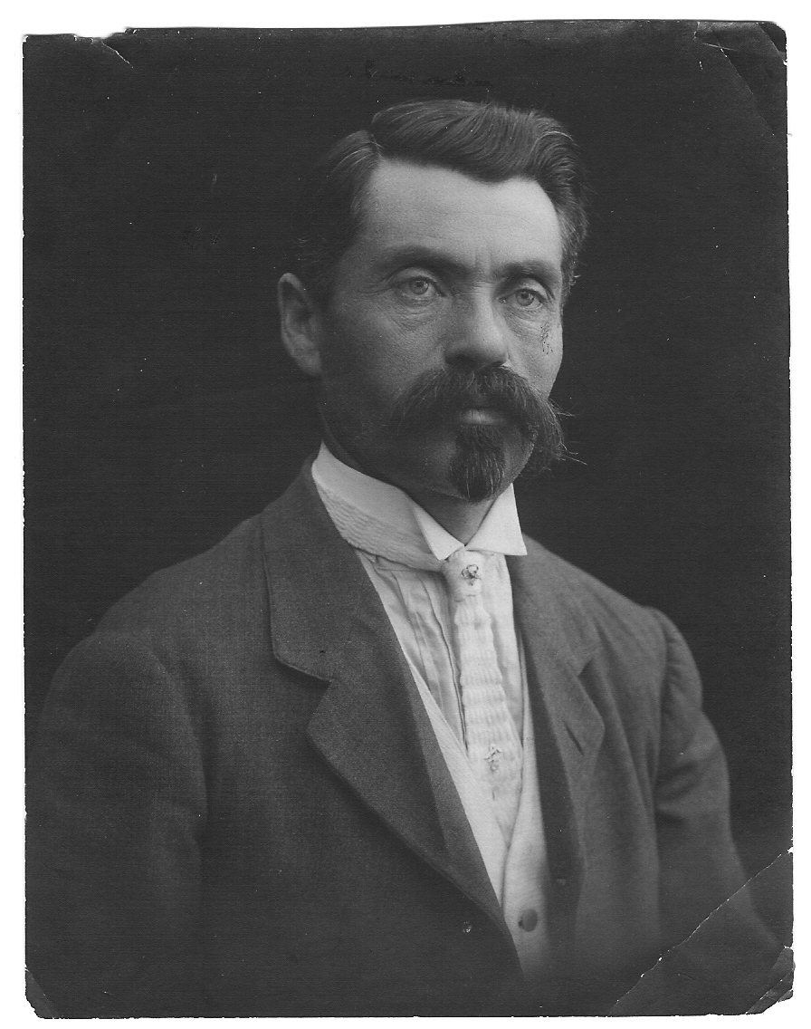 שמואל נתן וילסון היה קבלן בניין ישראלי, שבנה יותר מ-200 מבתיהן הראשונים של שכונת אחוזת בית ותל אביב הקטנה